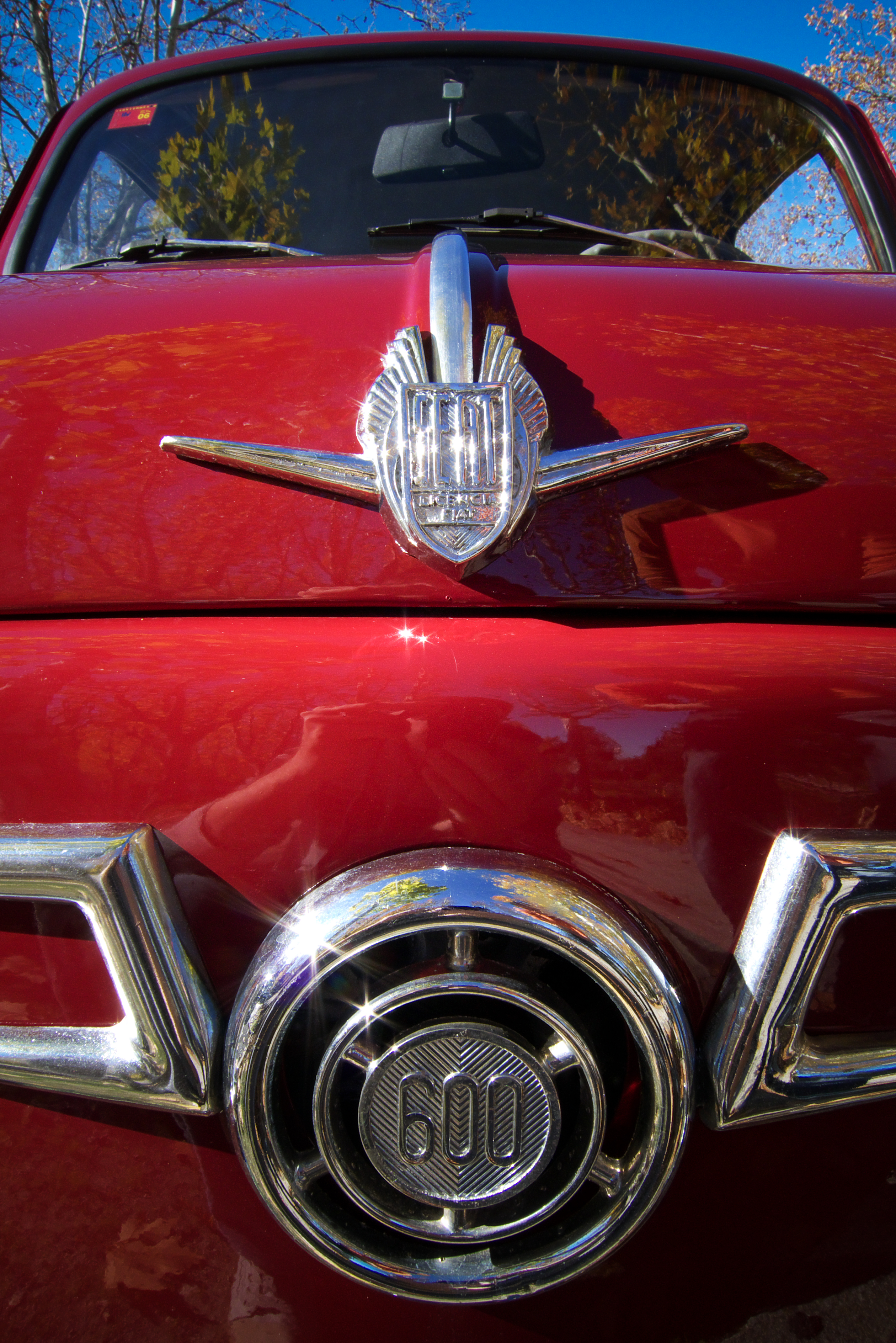 Madrid, Noviembre 2008